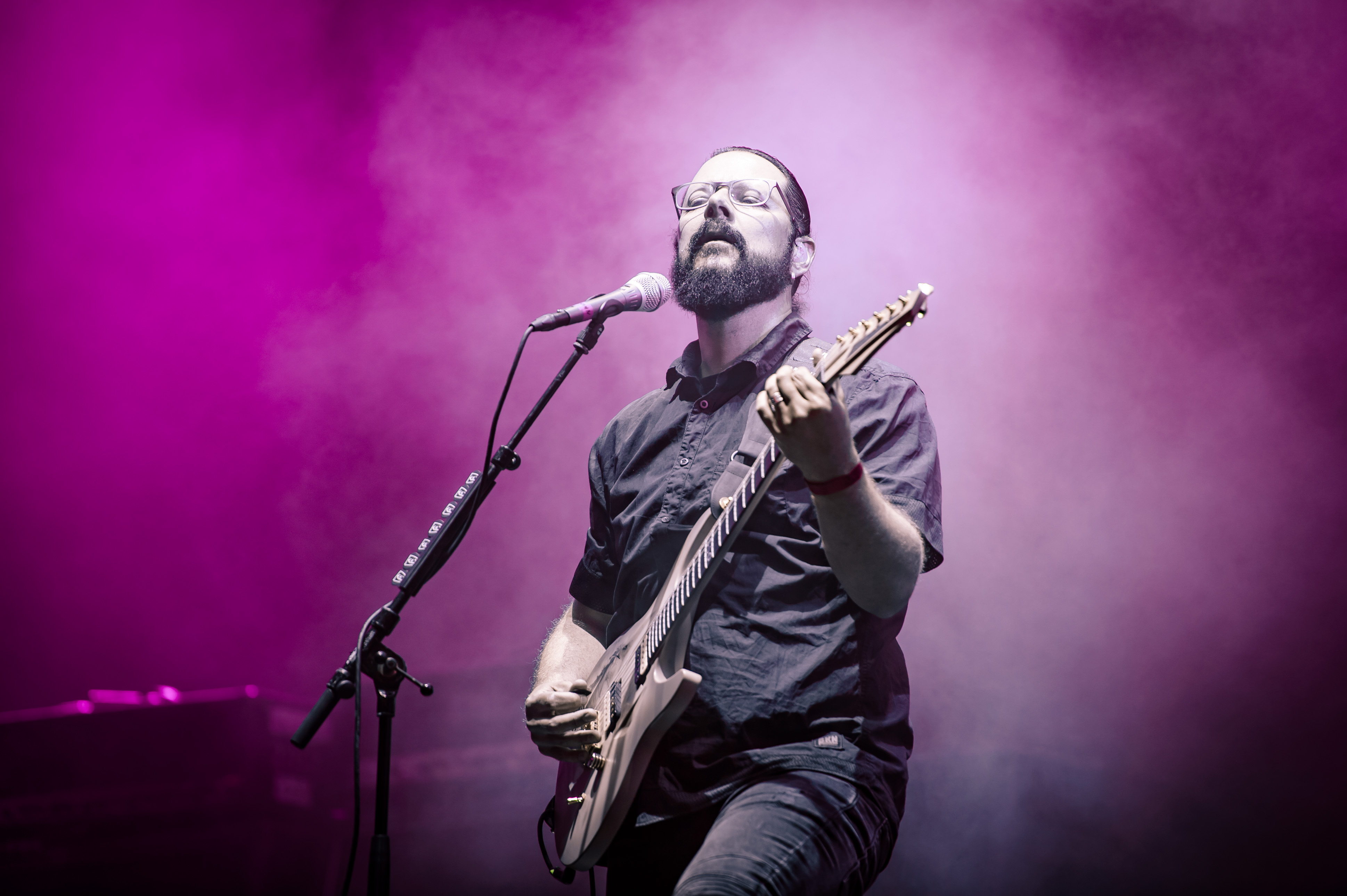 'Wacken Open Air 2017; Wacken': 'Emperor'